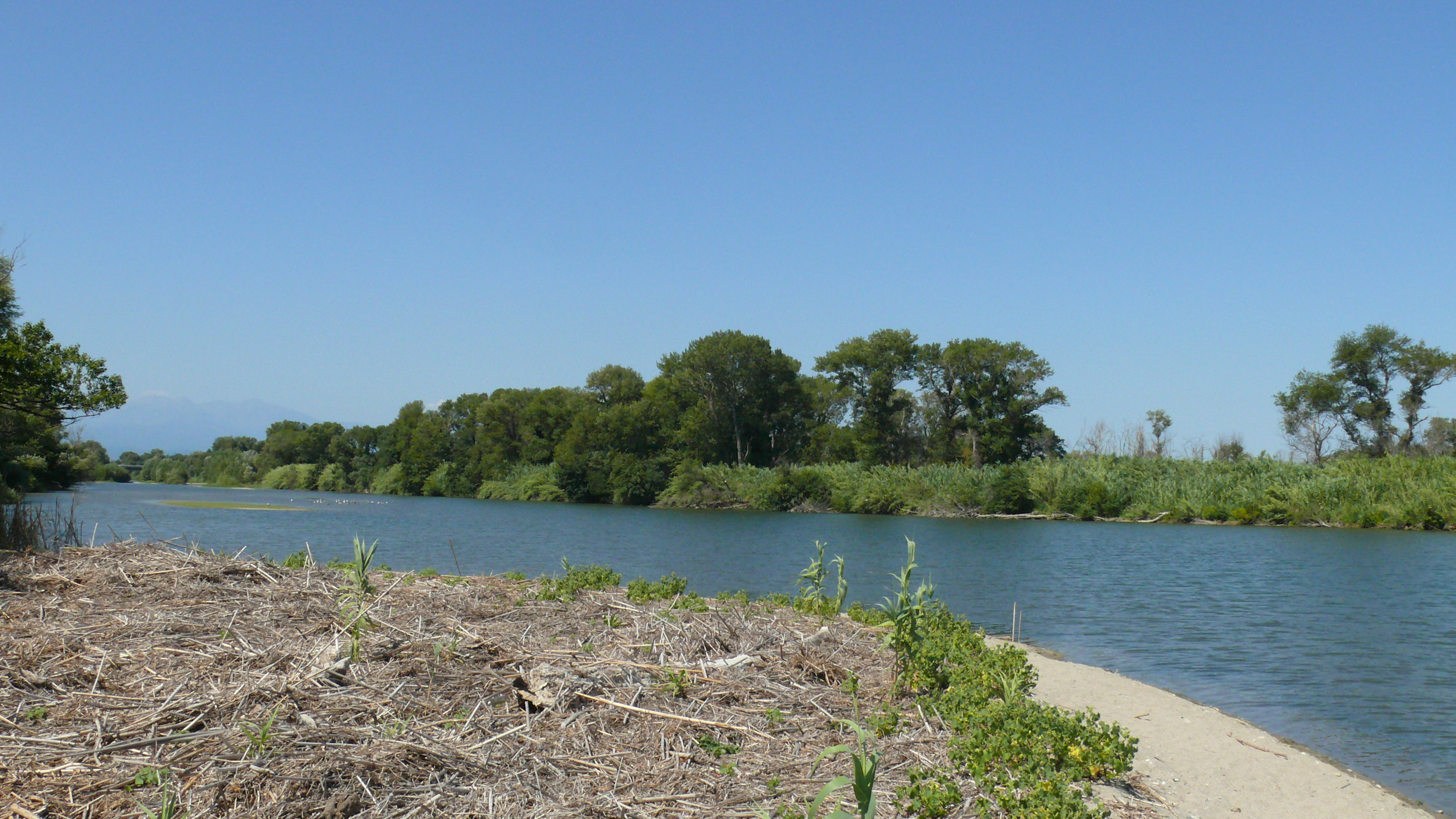 Embouchure du Tech dans la mer méditéranée à la réserve naturelle du Mas Larrieu sur la commune d'Argelès sur Mer